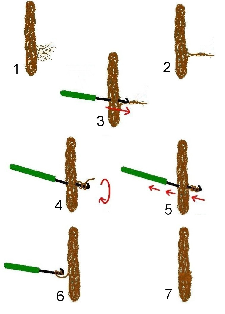 Häkelanleitung für Dreadlocks